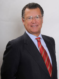 Mario Bertolino Rendic